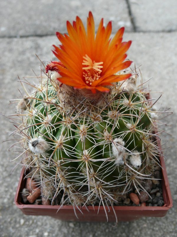 Parodia comarapana formerly Parodia mairanana